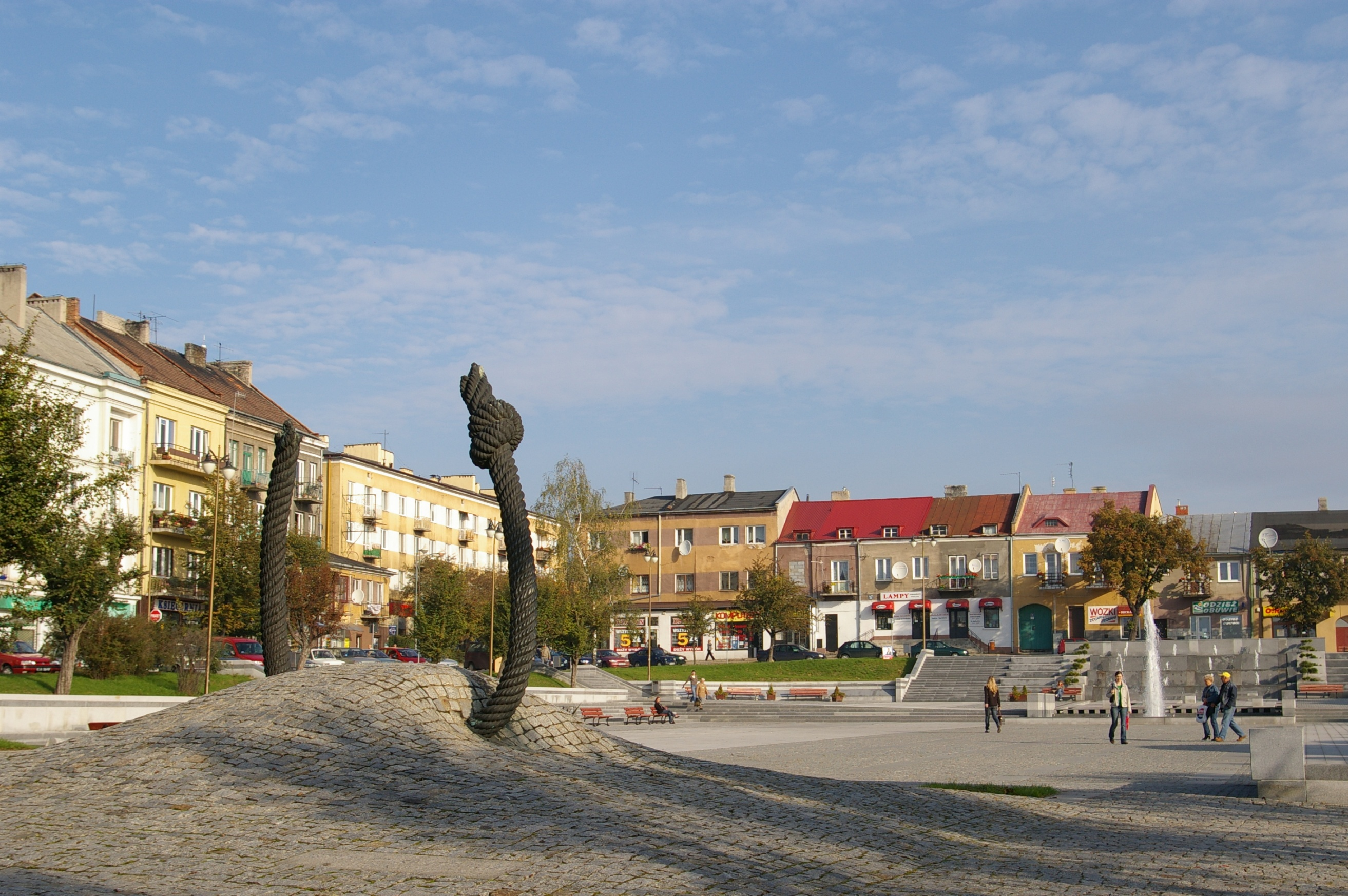 Rynek Ostrowca Świętokrzyskiego